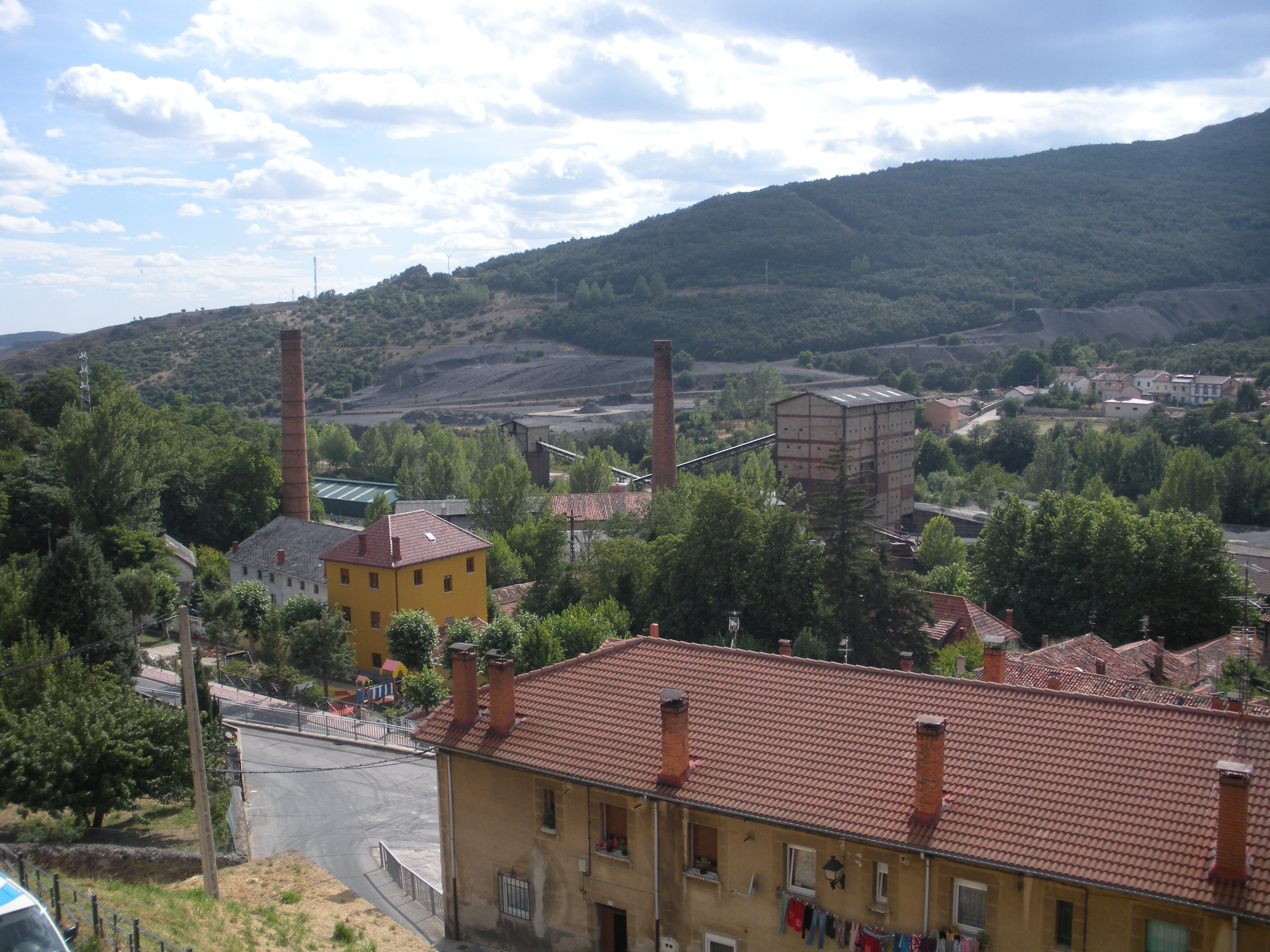 Imagen de la villa minera de Barruelo de Santullán, tomada el 18 de agosto de 2010 desde las instalaciones del Centro de Interpretación de la Minería.